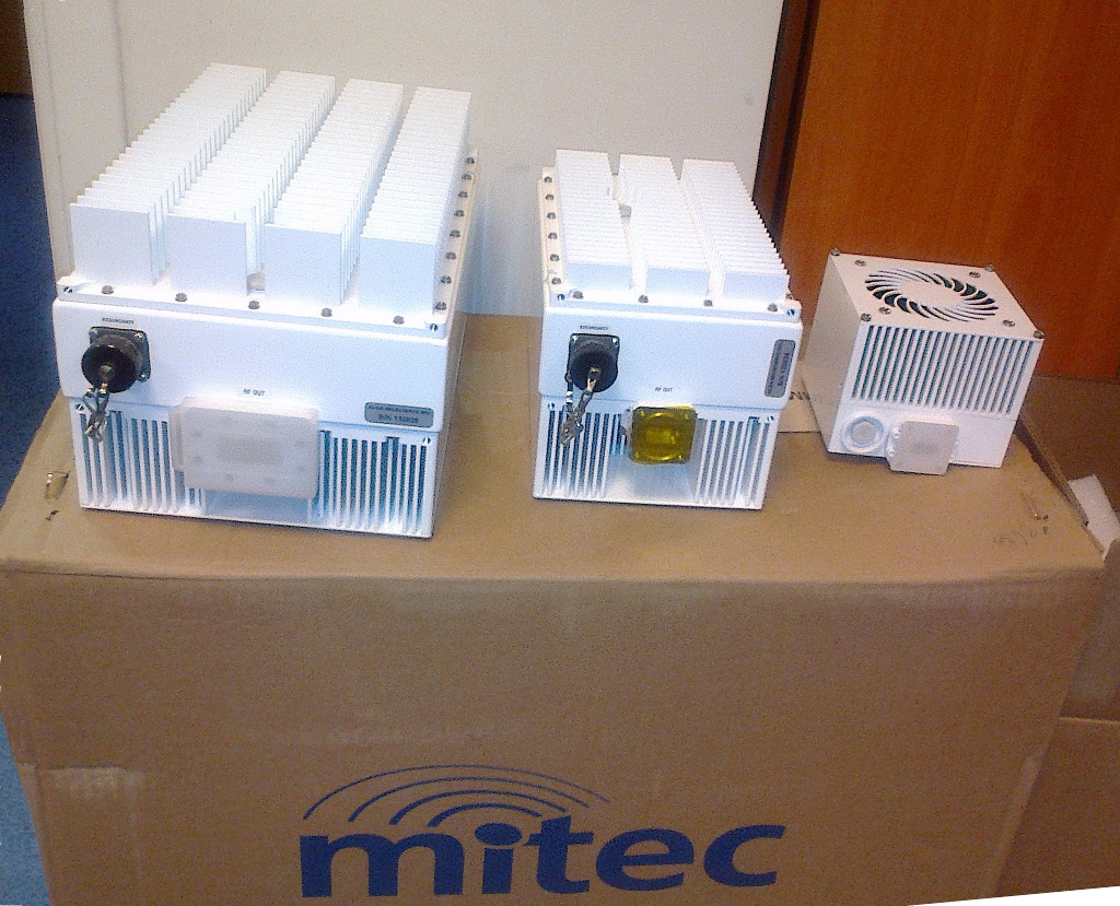 3 BUC (передающих усилителя) разной мощности - 100, 25 и 16 Ватт.